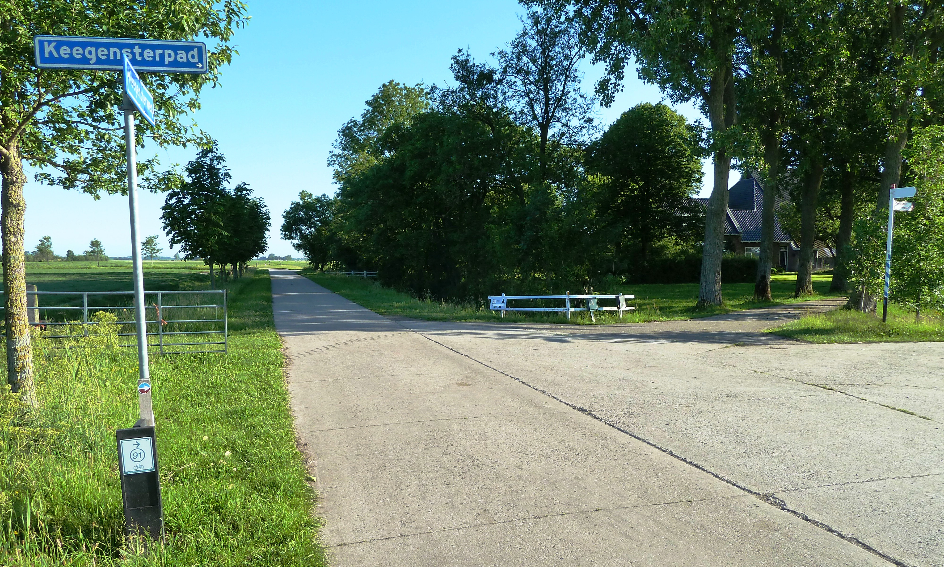 Kruispunt in het buurtschap De Keegen in de Friese gemeente Kollumerland en Nieuwkruisland.